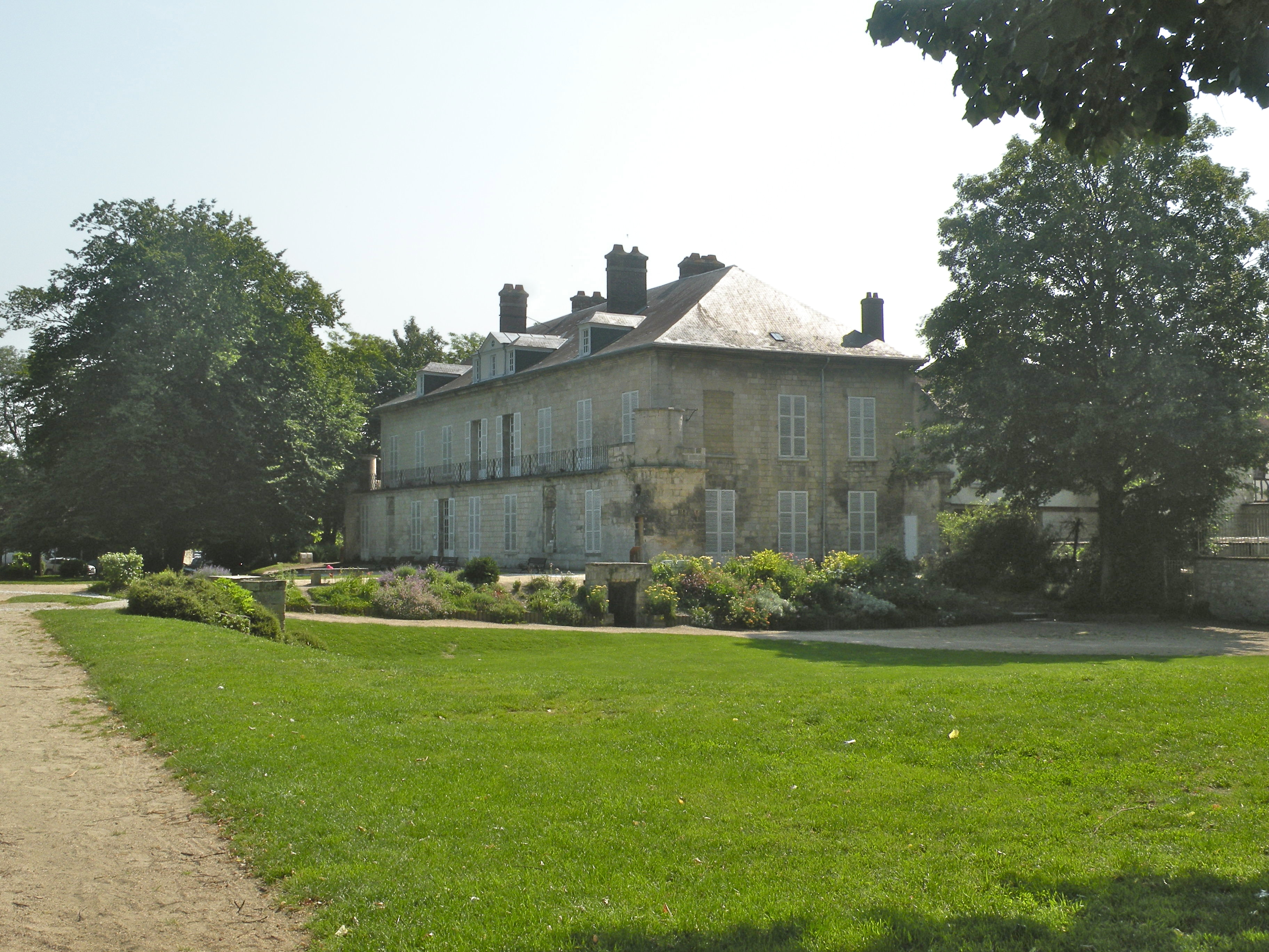 Musée Antoine Vivenel vu depuis le parc